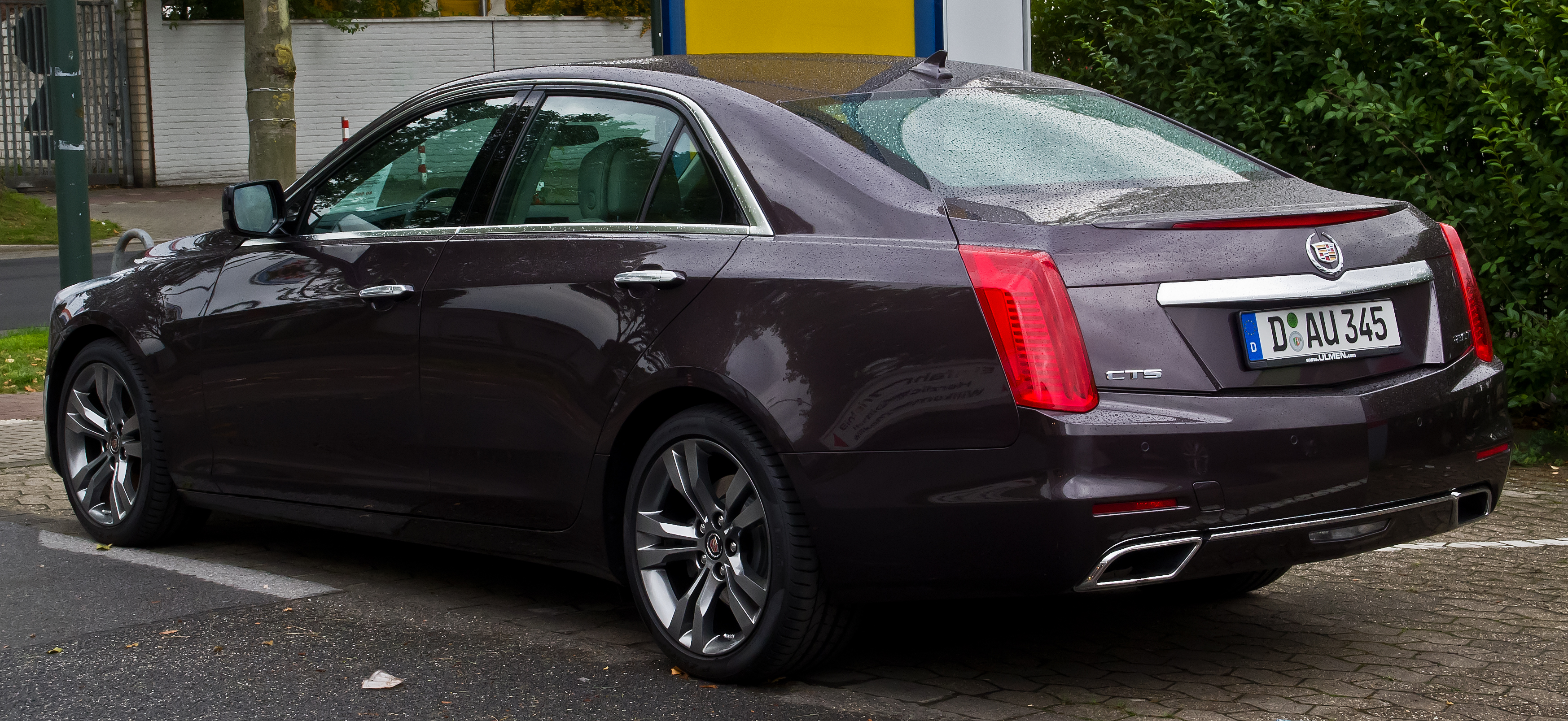 Cadillac CTS 2.0 Turbo Luxury (III)